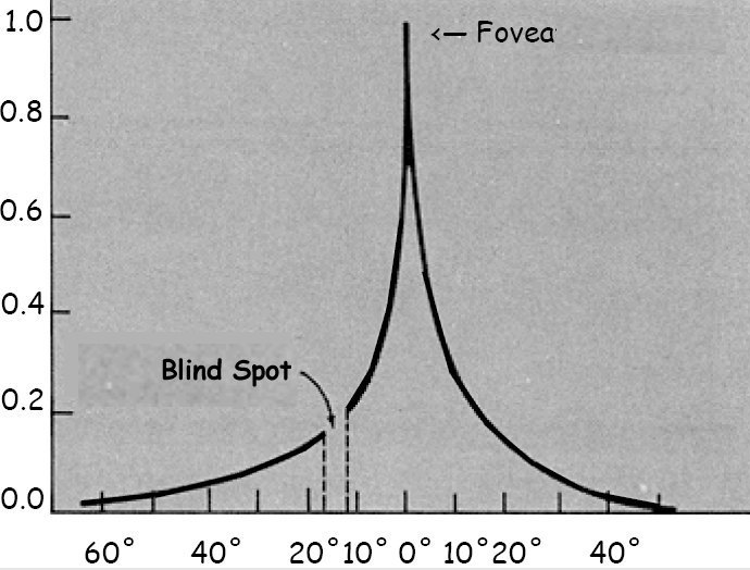 Bildschärfe auf der Netzhaut